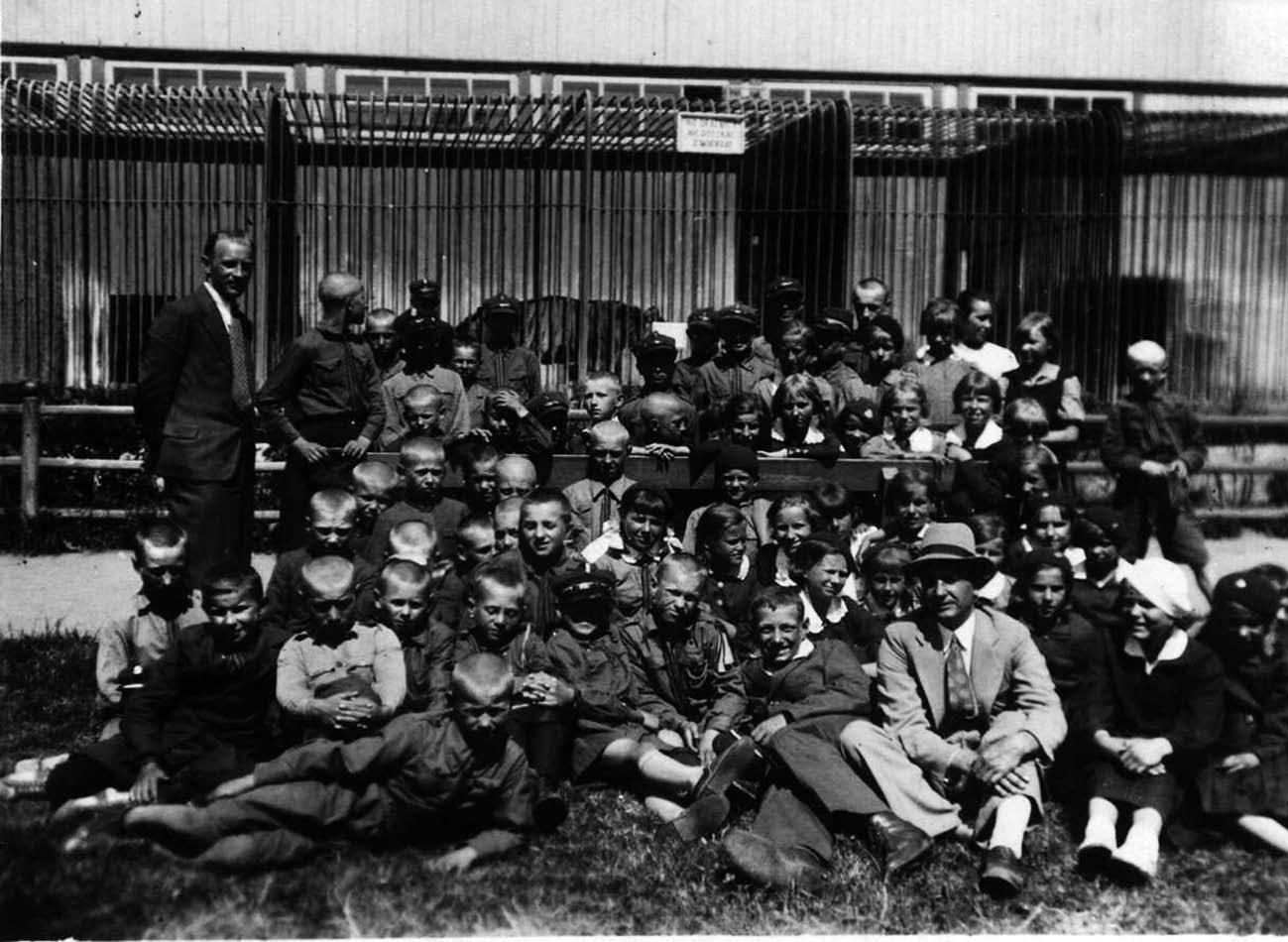 Школьная экскурсия в Гродненском зоопарке. Фото середины 1930-х гг.